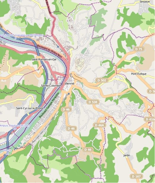 Carte de la Vienne, Isère This map of Vienne was created from OpenStreetMap project data, collected by the community. This map may be incomplete, and may contain errors. Don't rely solely on it for navigation.